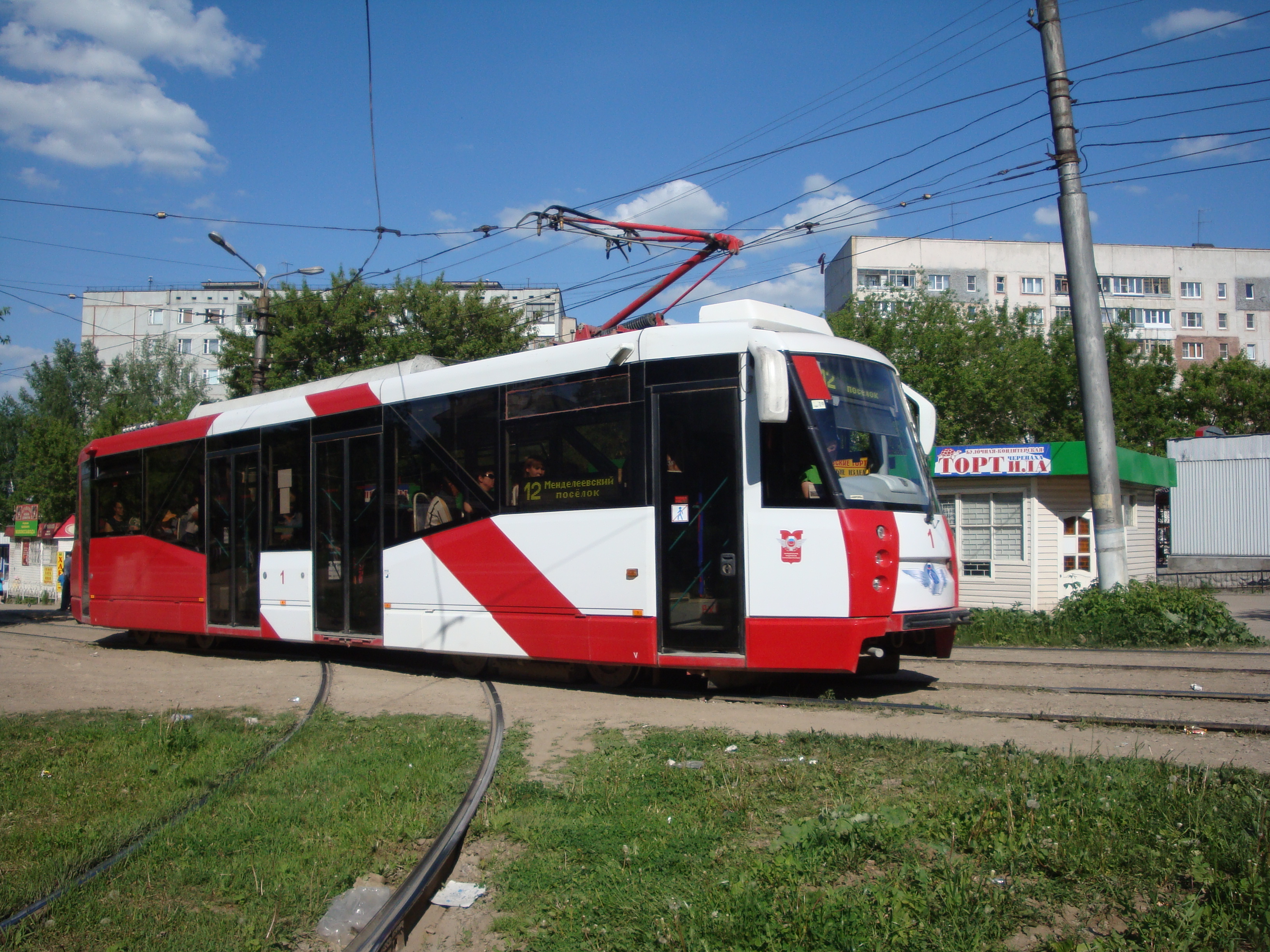 ЛМ-2008